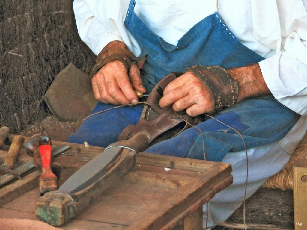 Foto tirada em Castro Marim durante os dias medievais.